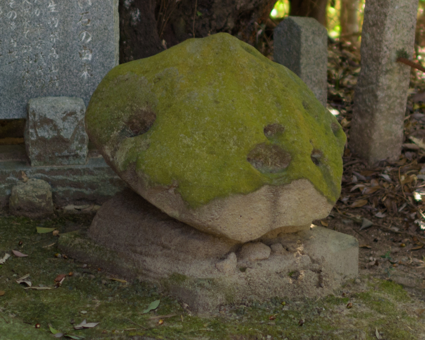 日出神社（京都府相楽郡精華町柘榴）の雨乞い石